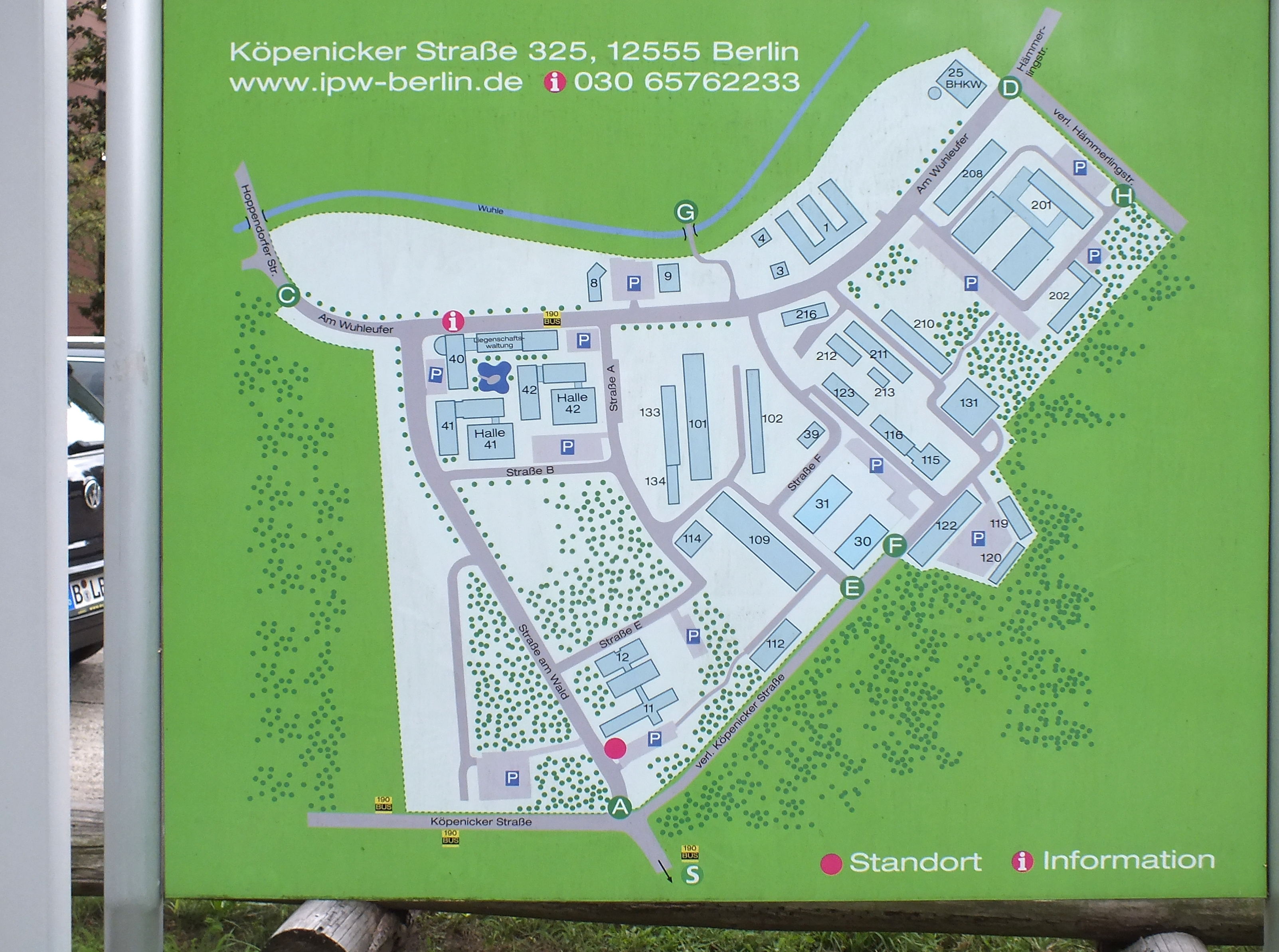 Straße in Berlin-Köpenick, Köpenicker Straße 325: Lageplan des Straßensystems im Innovationspark Wuhlheide